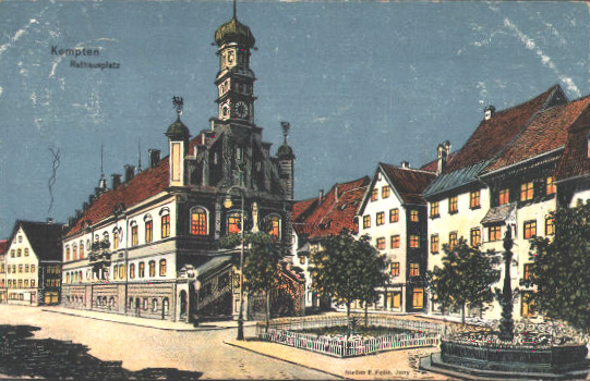 Ansichtskarte Motiv: Kempten, Rathaus